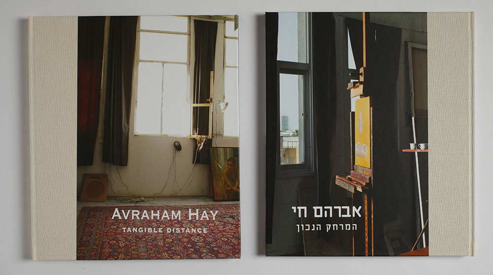 כריכת הספר "המרחק הנכון"